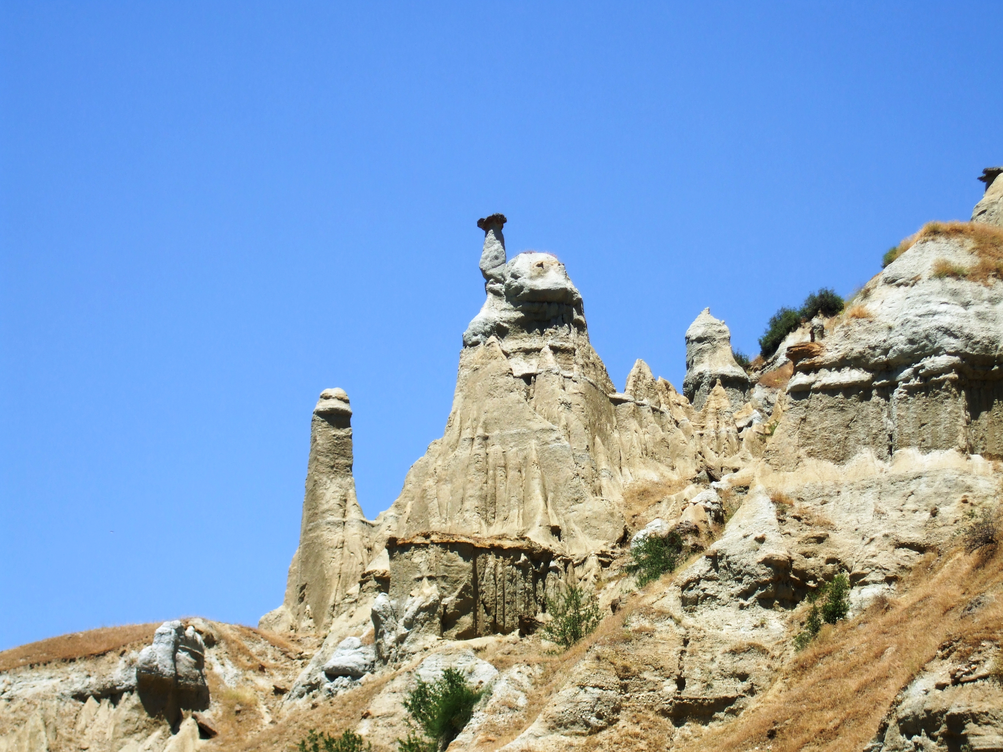 Camel Rock-Kula; Yurtbaşı